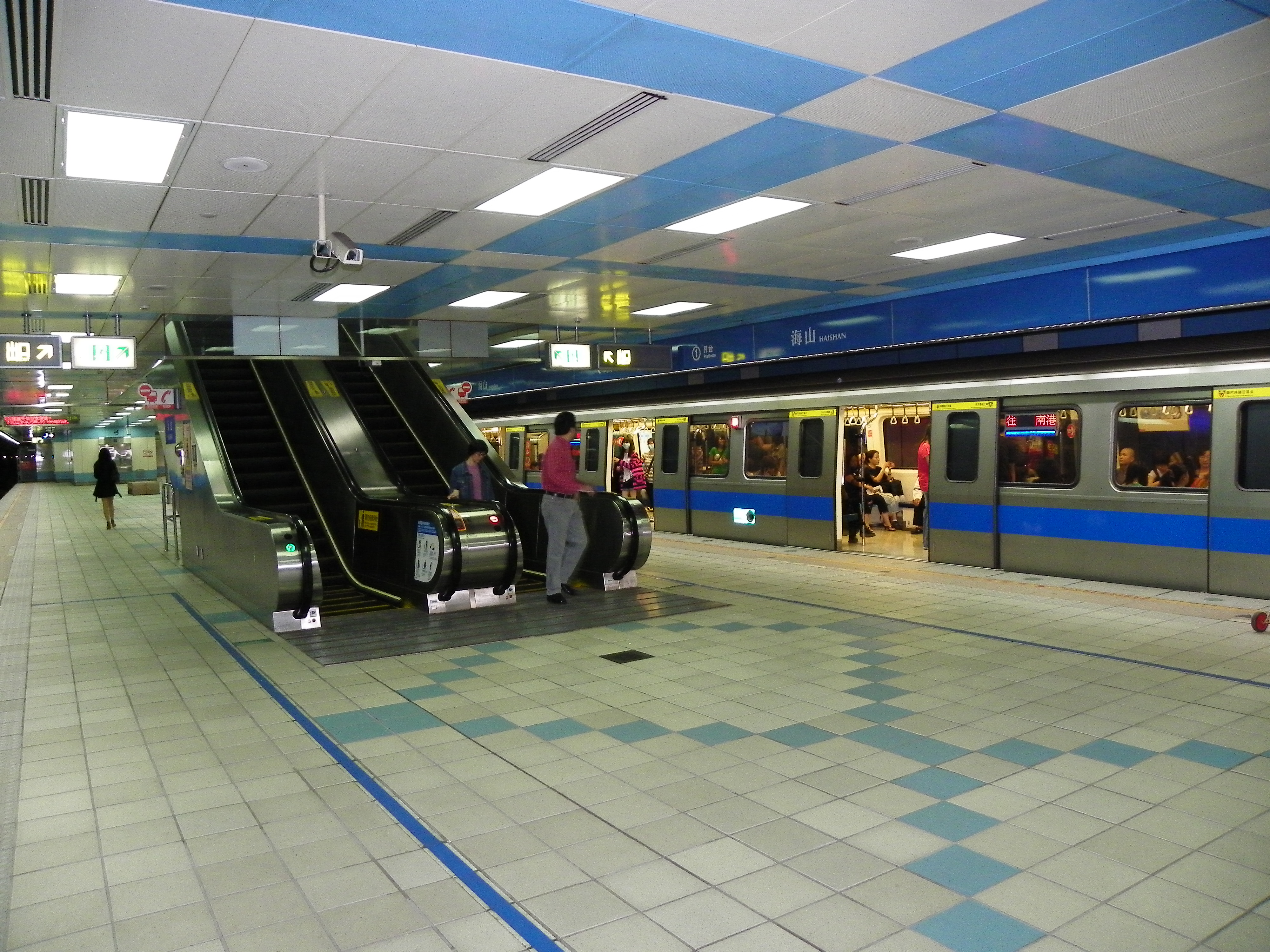 台北捷運海山駅ホーム1番線。中文（台灣）: 台北捷運海山站1月台。